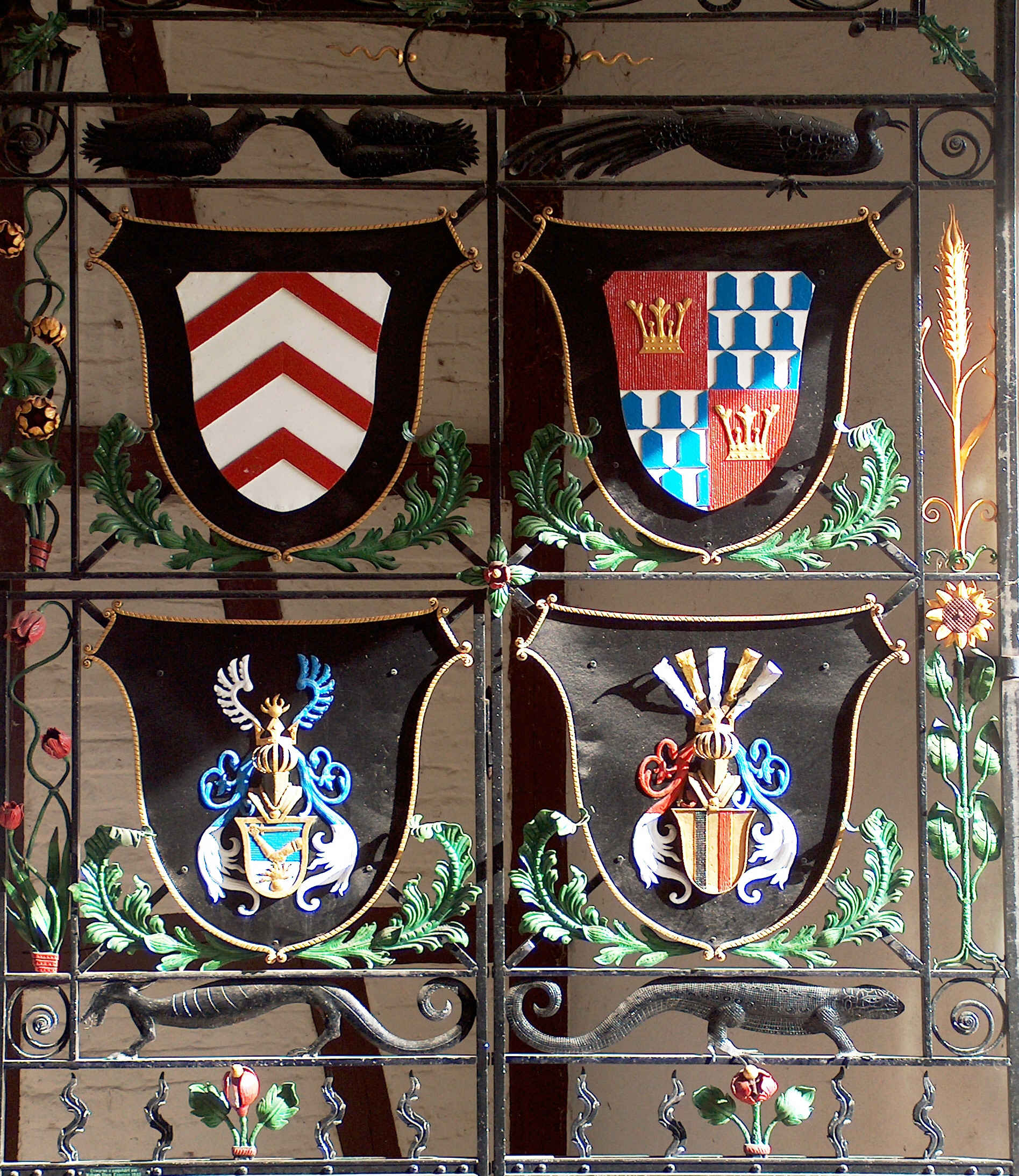 Wappen am Hoftor des Rettershofs in Kelkheim bei Frankfurt/Main